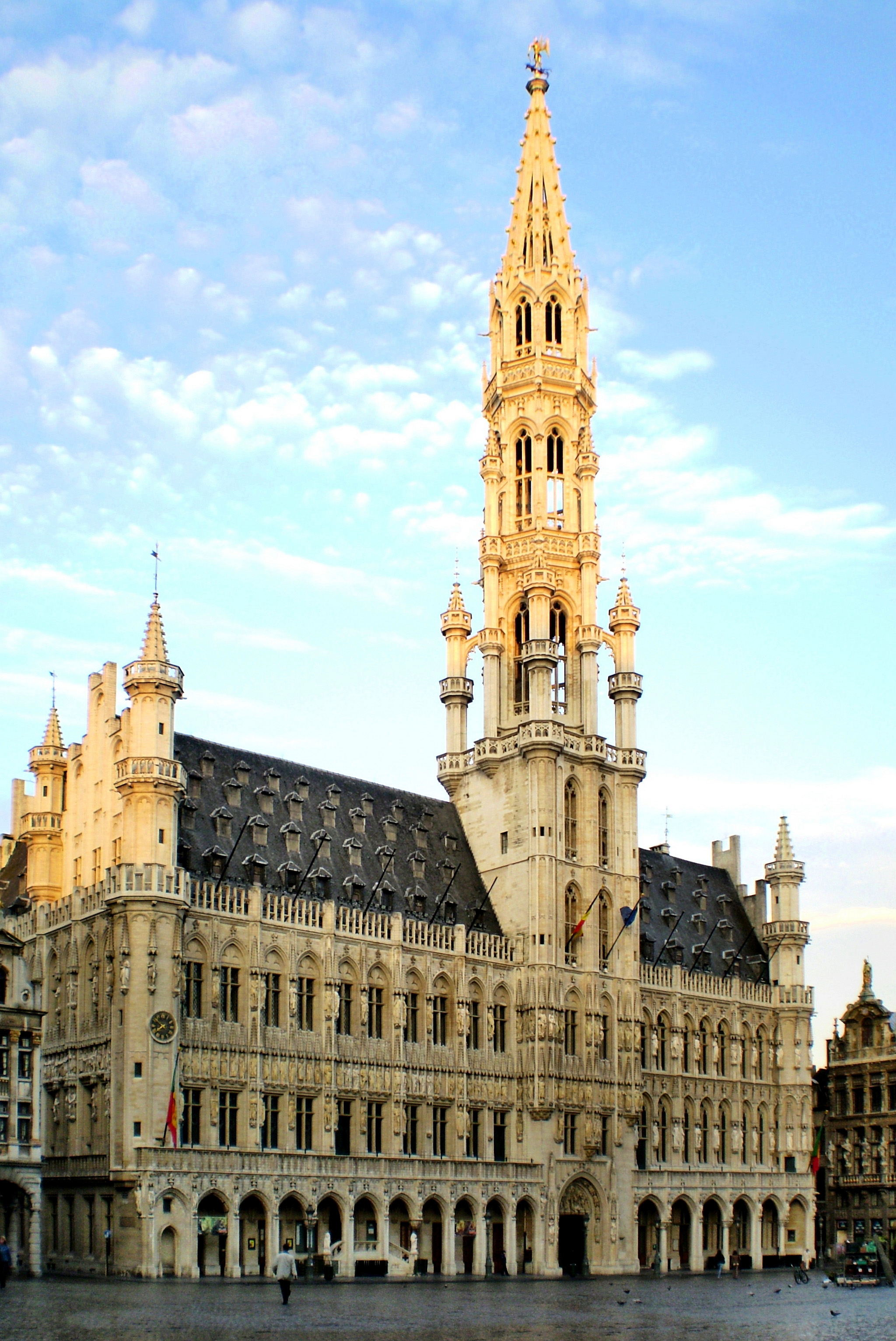 Hôtel de Ville de Bruxelles